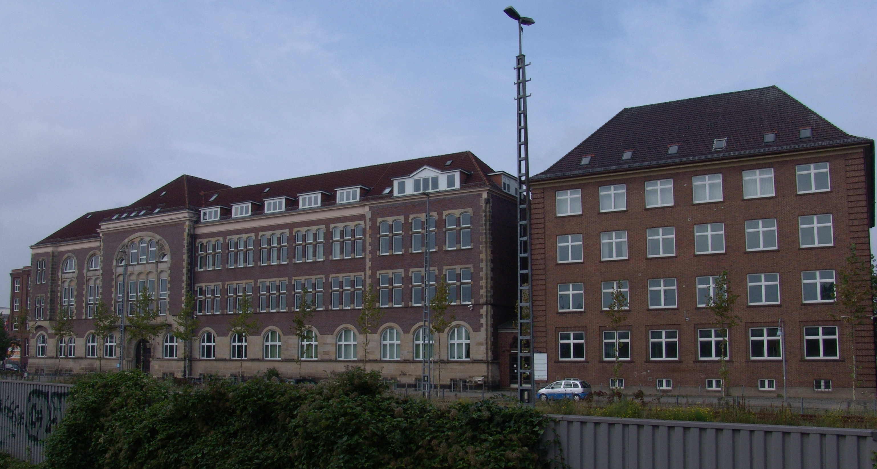 A.G. "Weser", Verwaltungsgebäude in Bremen, Schiffbauerweg 2, 4 / Hermann-Prüser-Straße, Ludwig-Plate-Straße.Die Gesamtanlage ist ein geschütztes Kulturdenkmal in der Freien Hansestadt Bremen, mit der Nr. 1745 beim Landesamt für Denkmalpflege registriert.